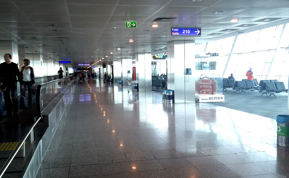 Gates am Atatürk Flughafen Istanbul